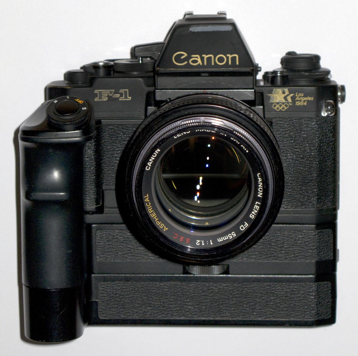 Canon F-1New AE Los Angeles 1984, mit Canon 1.2/55mm ASPHERICAL